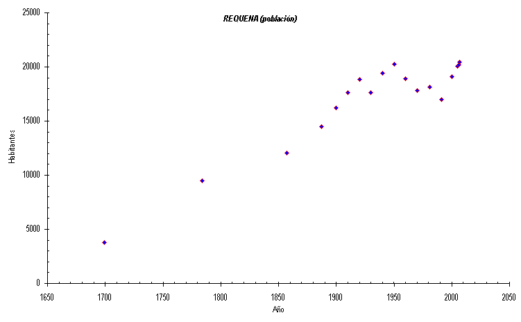 Gráfico de la evolución de la población del municipio de Requena.